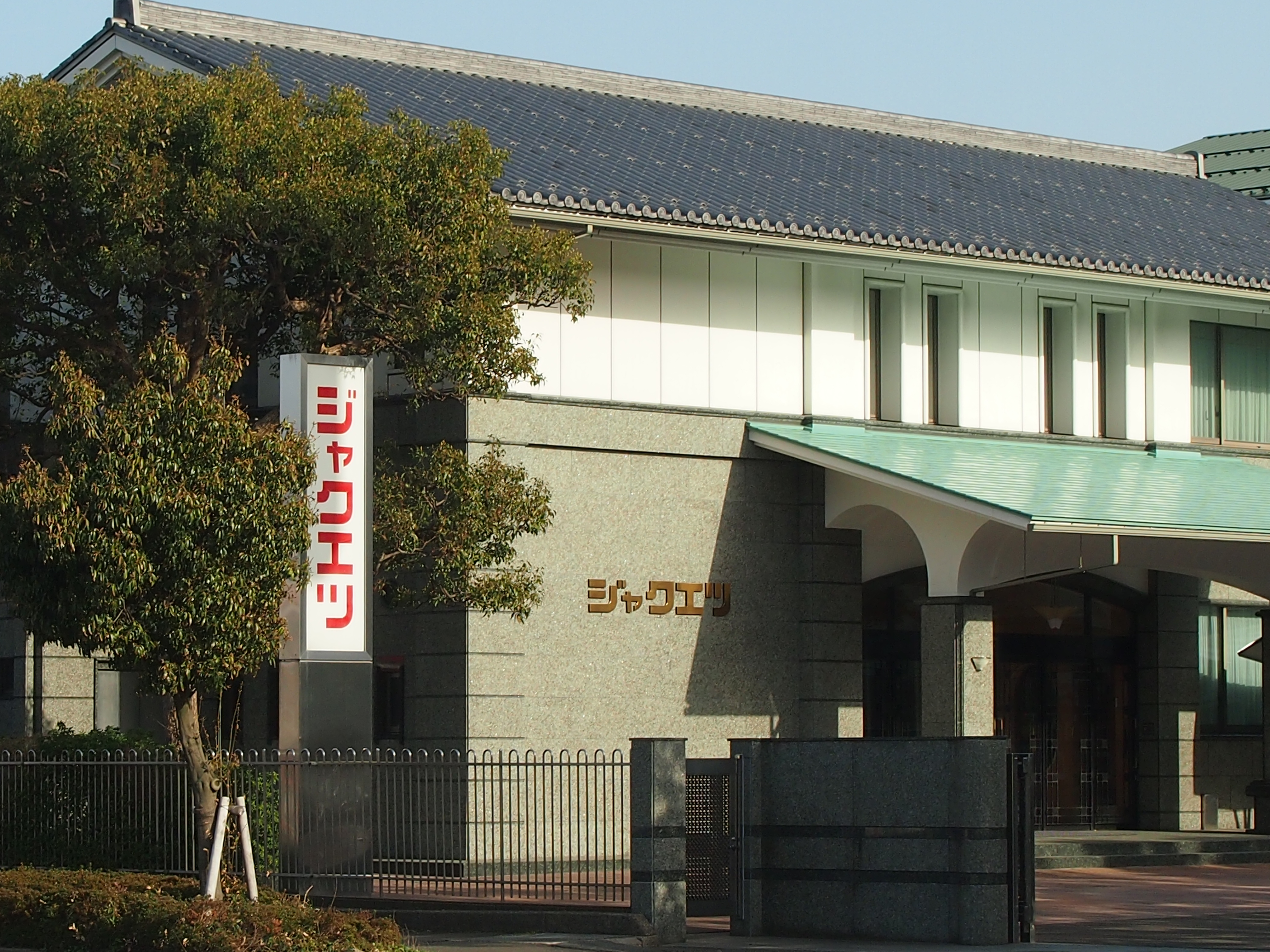 株式会社ジャクエツ